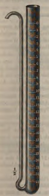 Gay-Lussac burette